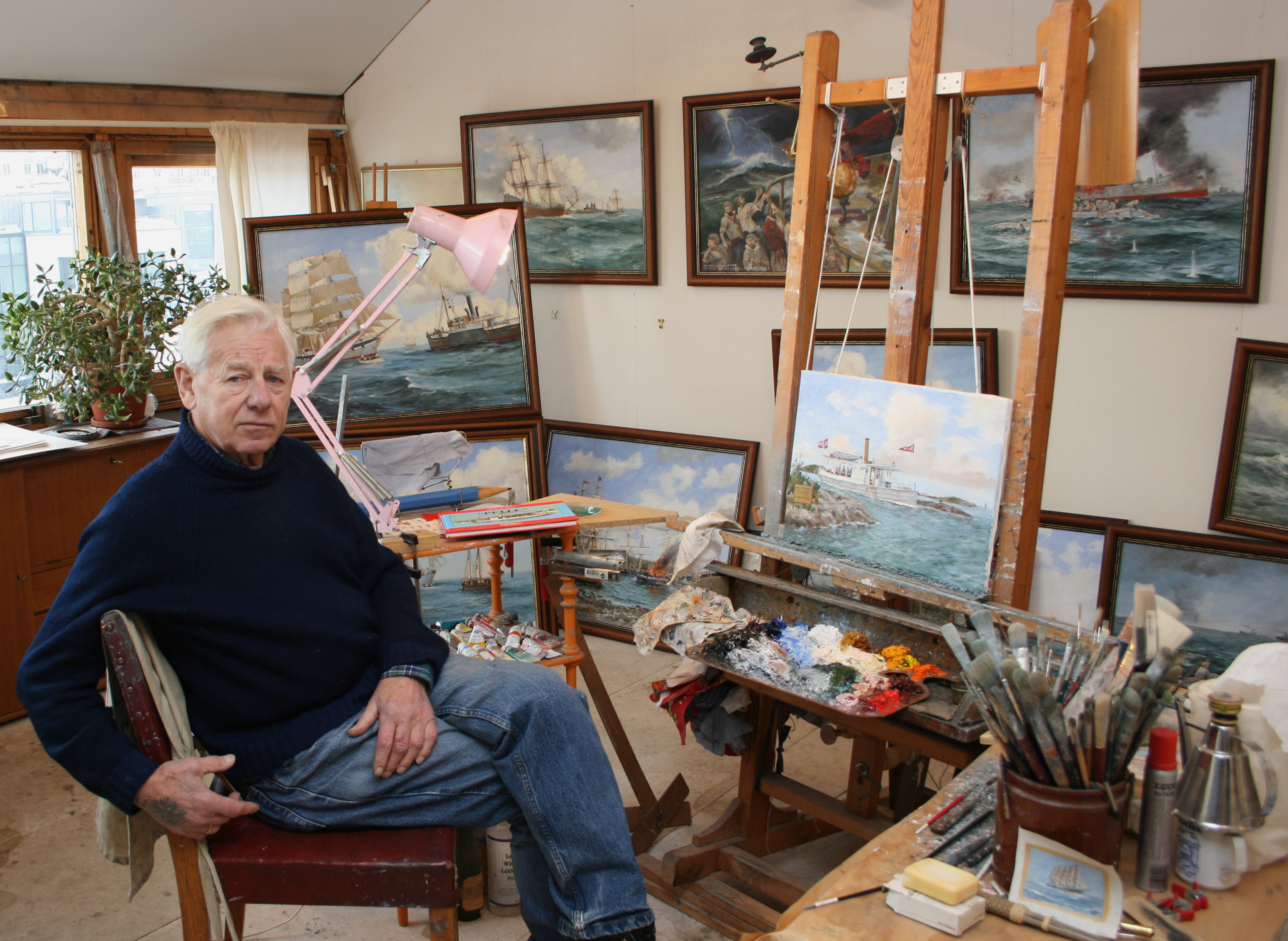 Ant Lepson i sitt atelier